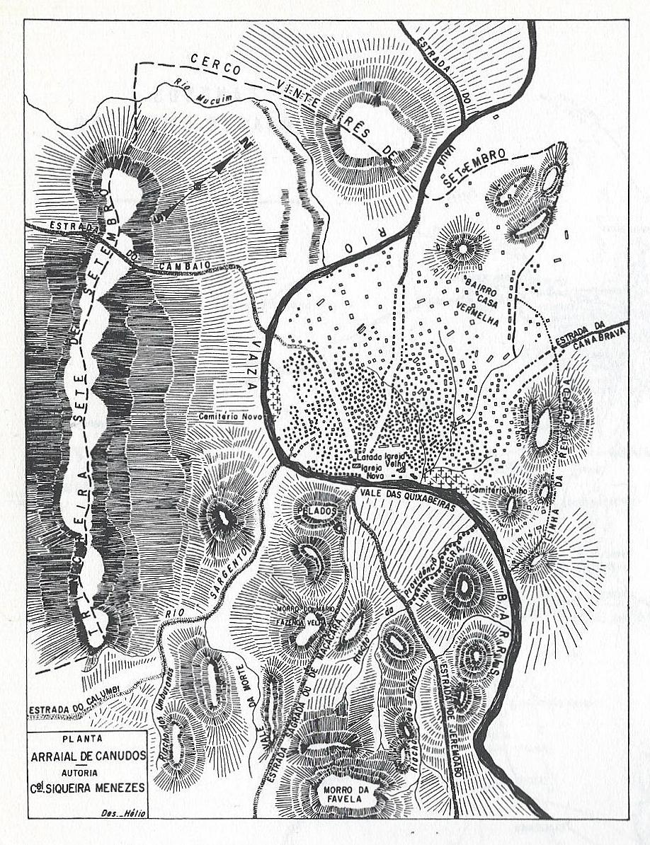 Plan de l'ancien village de Canudos (Bahia, Brésil), établi par le colonel Siqueira Menezes, 1897.